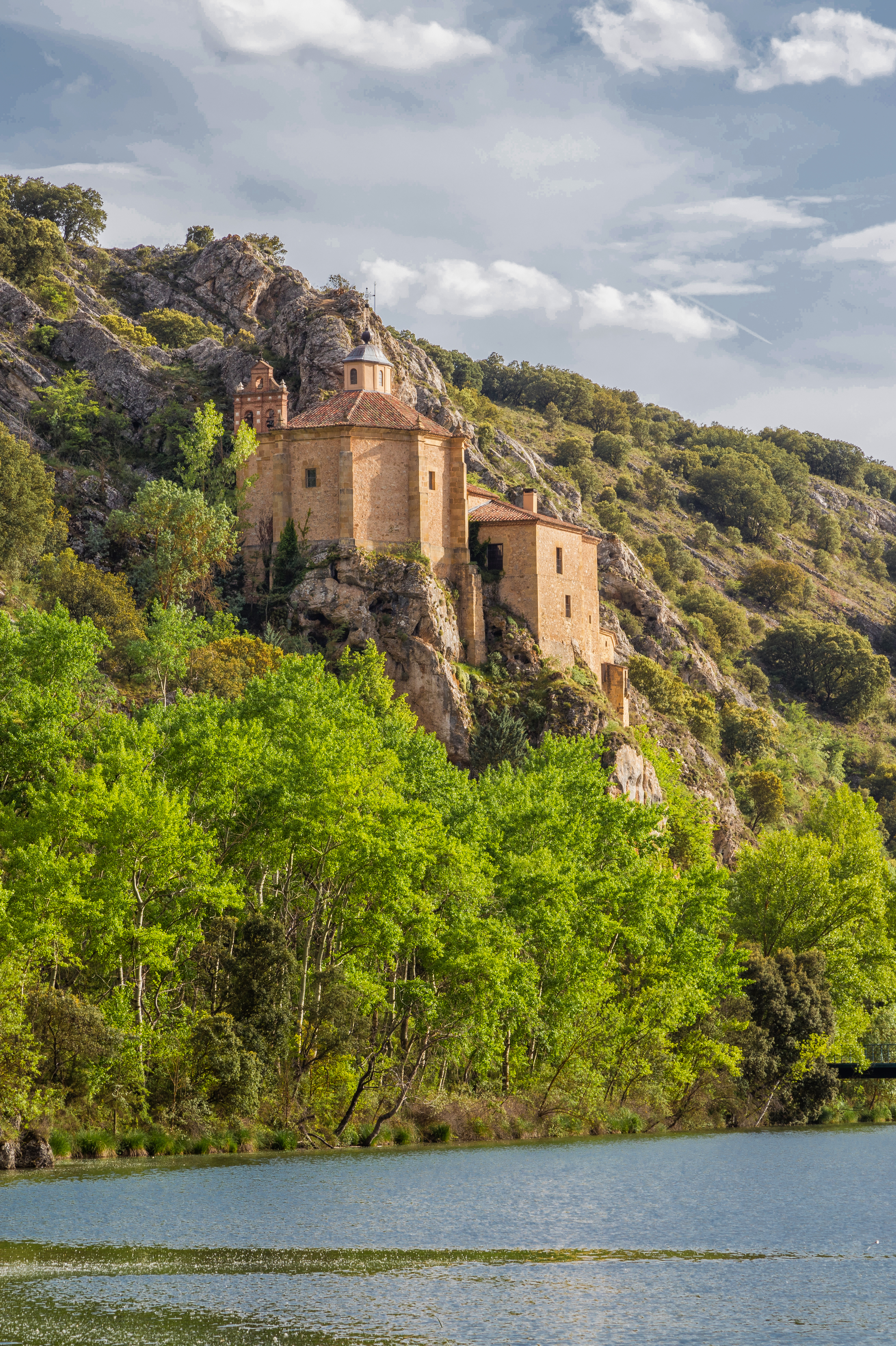 Ermita de San Saturio, Soria, España